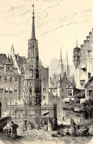 Schöner Brunnen in Nürnberg